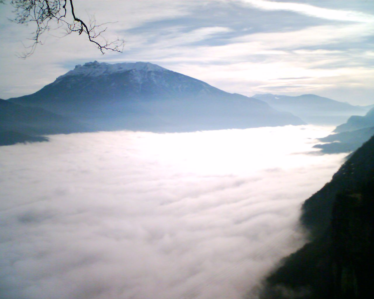 Val d'Adige